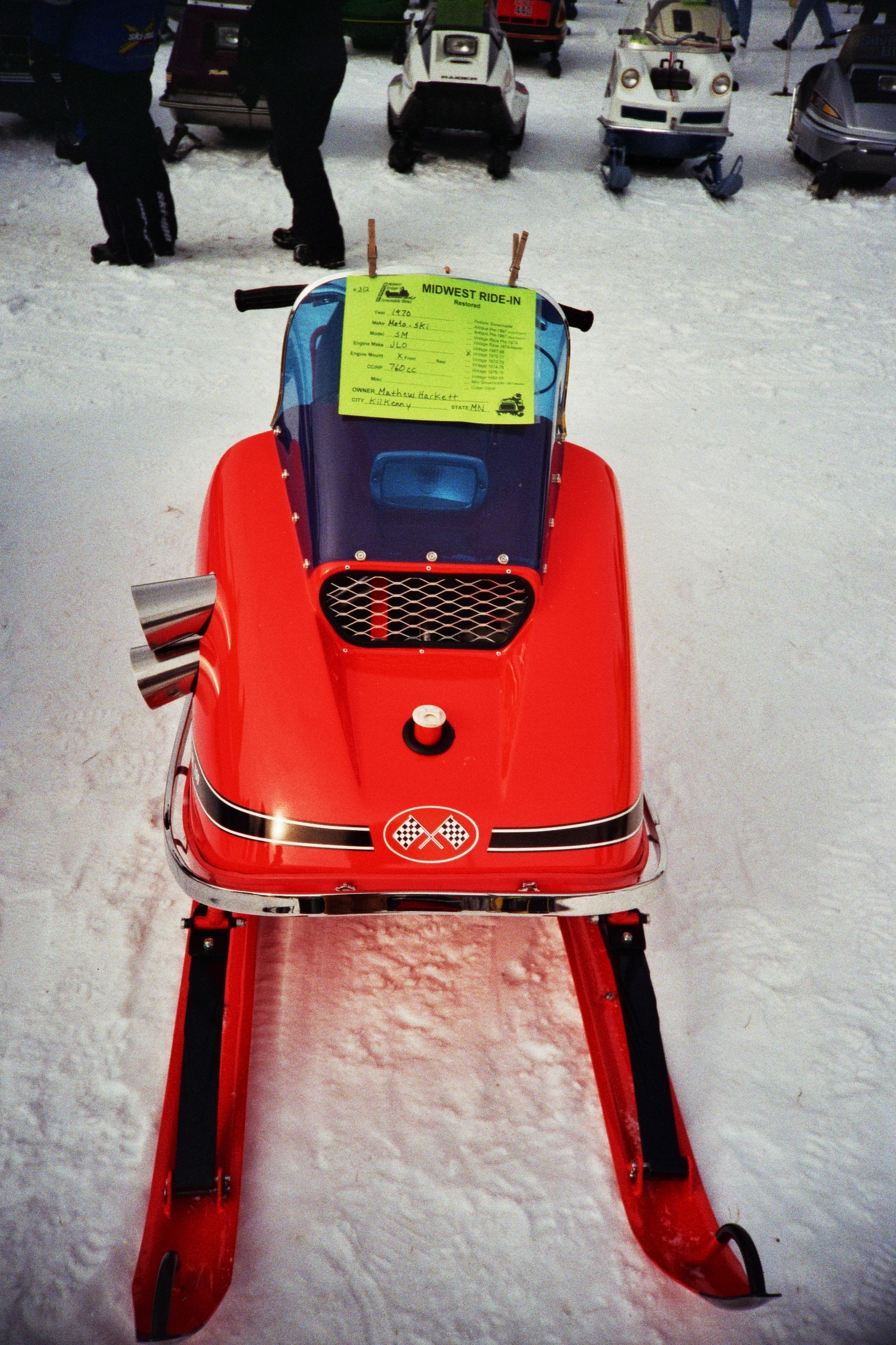 1970 Moto-Ski SM